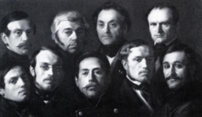 Neuntöter, Übername der neun Belegärzte des Alice-Hospital Darmstadt